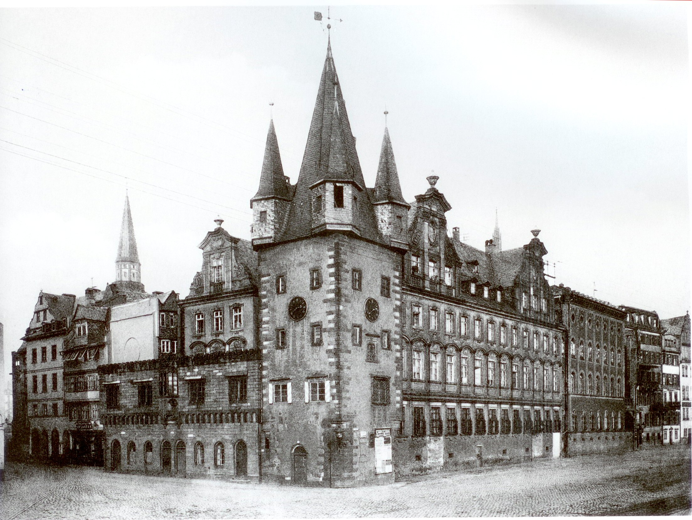 Frankfurt am Main, Germany. Der Saalhof um 1900